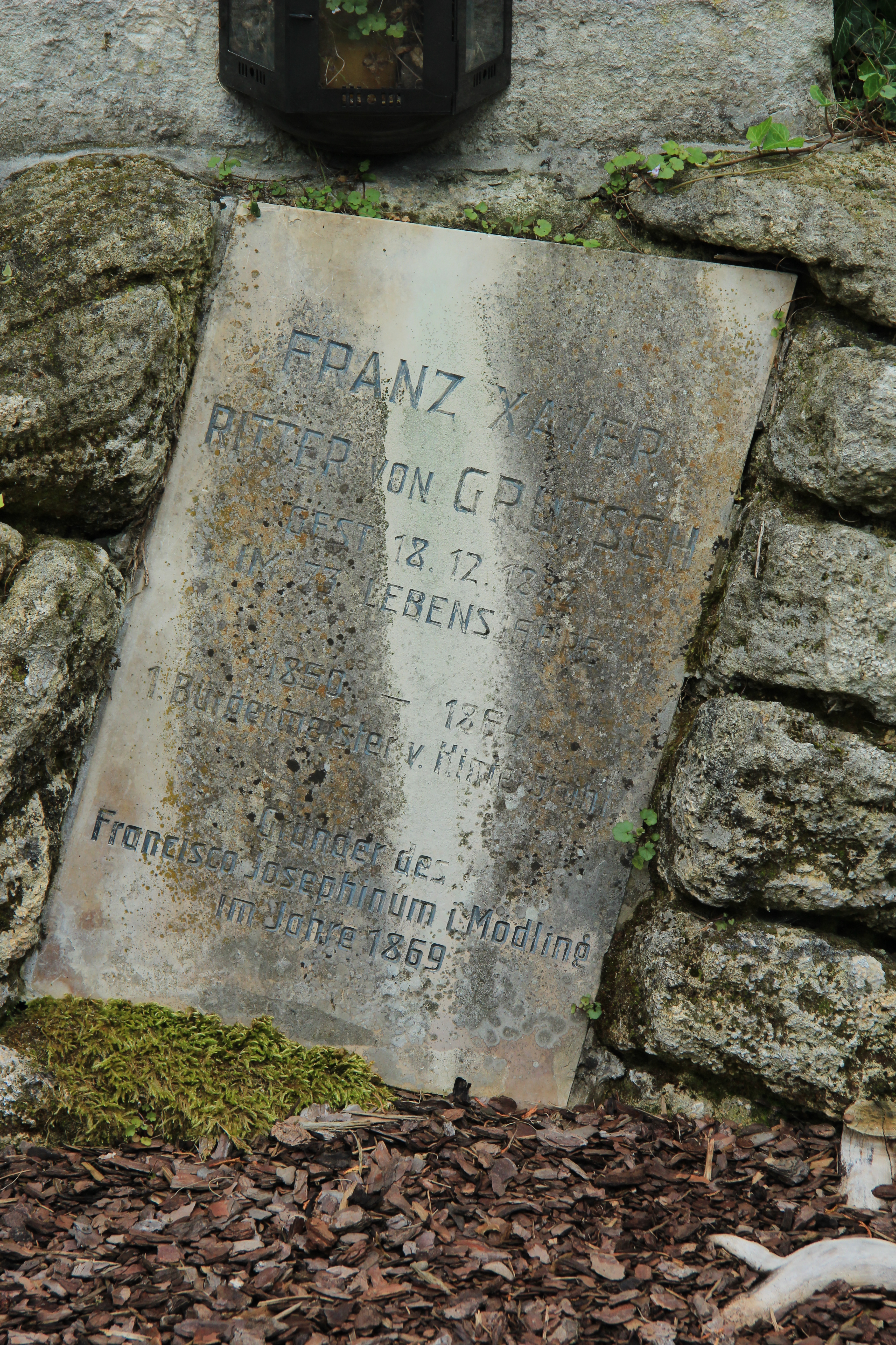 Grab von Franz Xaver von Grutsch am Friedhof Hinterbrühl, Niederösterreich